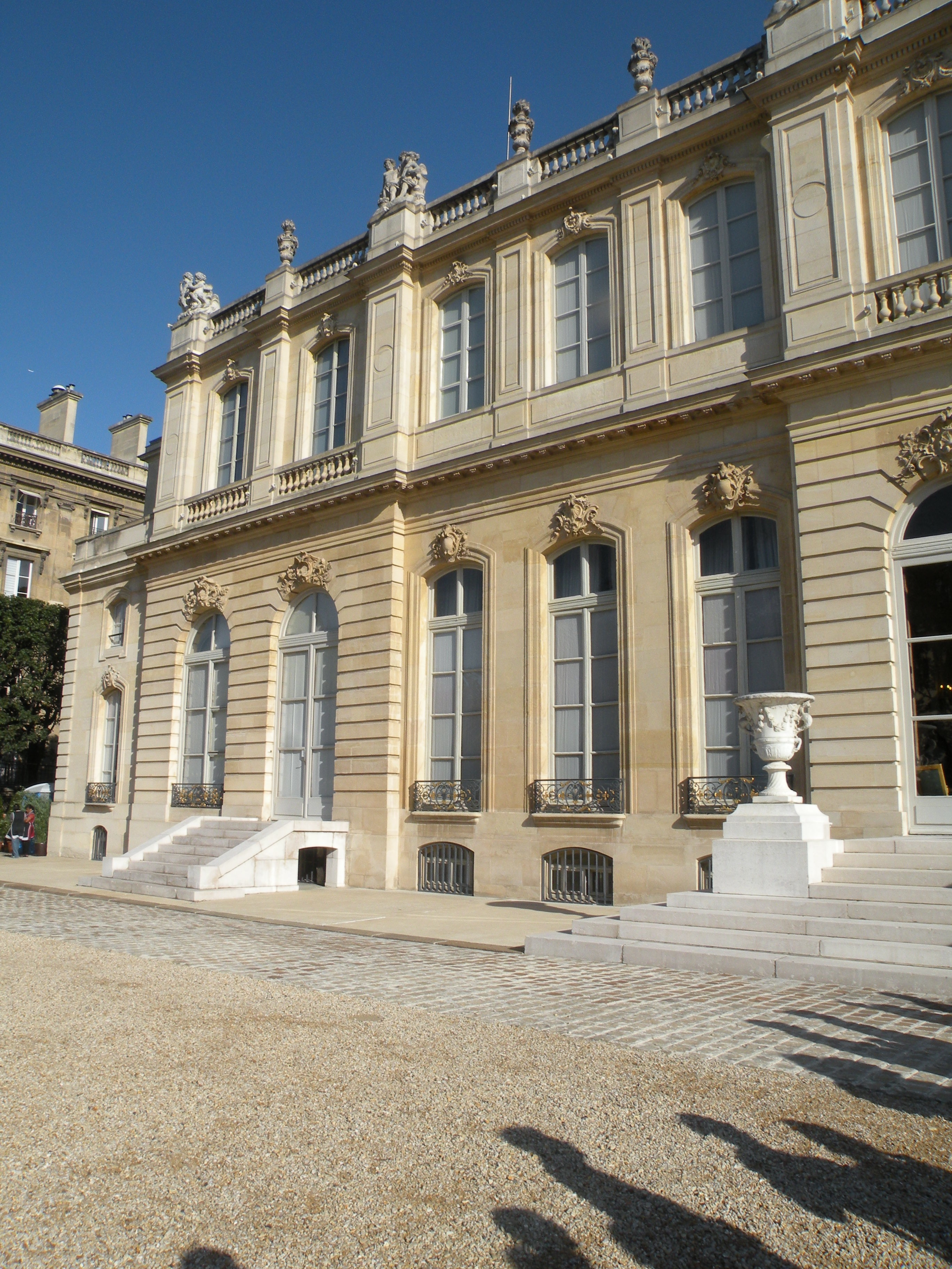 facade de l'hotel de lassay